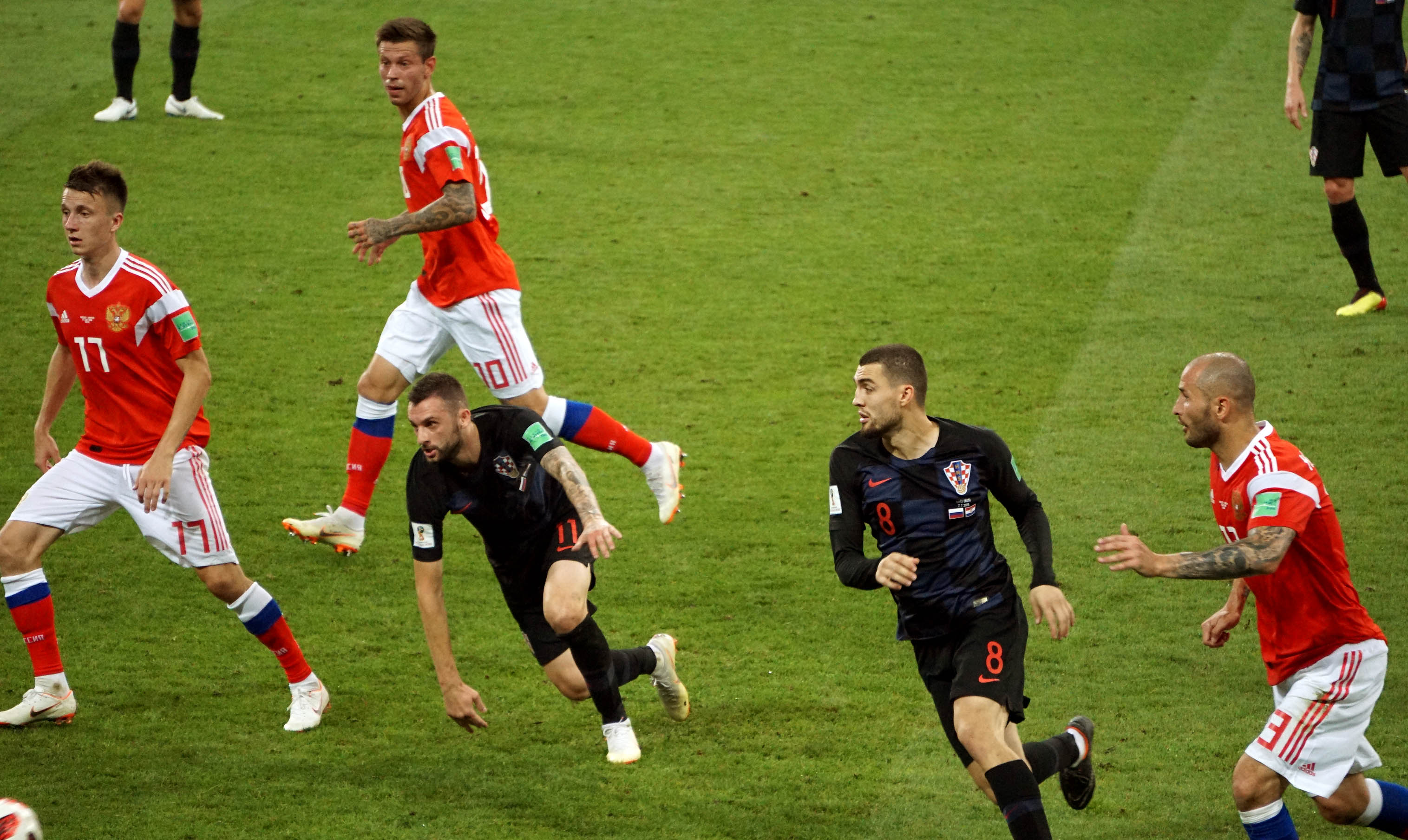 7 июля 2018 года сборная Хорватии обыграла сборную России со счётом 2:2 (4:3) по пенальти на ЧМ-2018 на стадионе «Фишт».